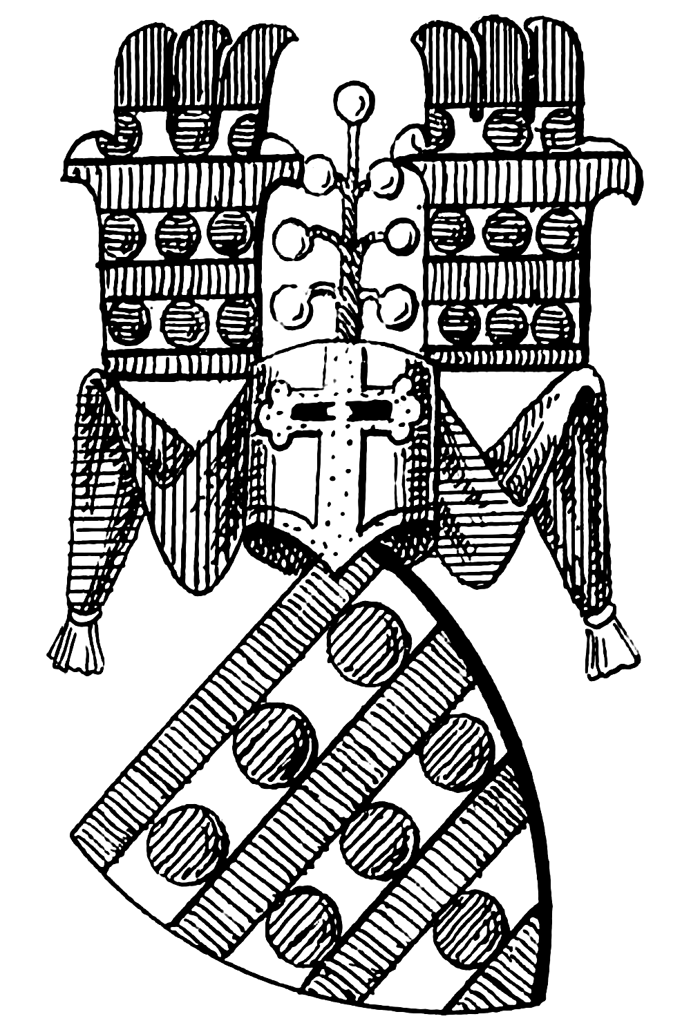 neueres Stammwappen derer von Linsingen